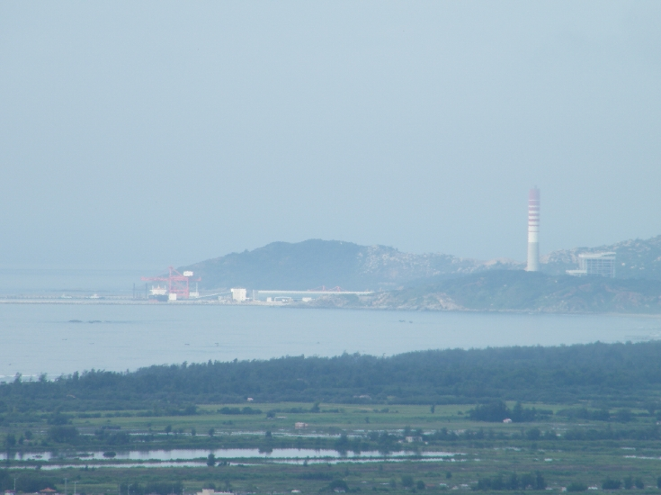 华能汕头海门电厂和海门港，在达濠小望山向西南方向望。